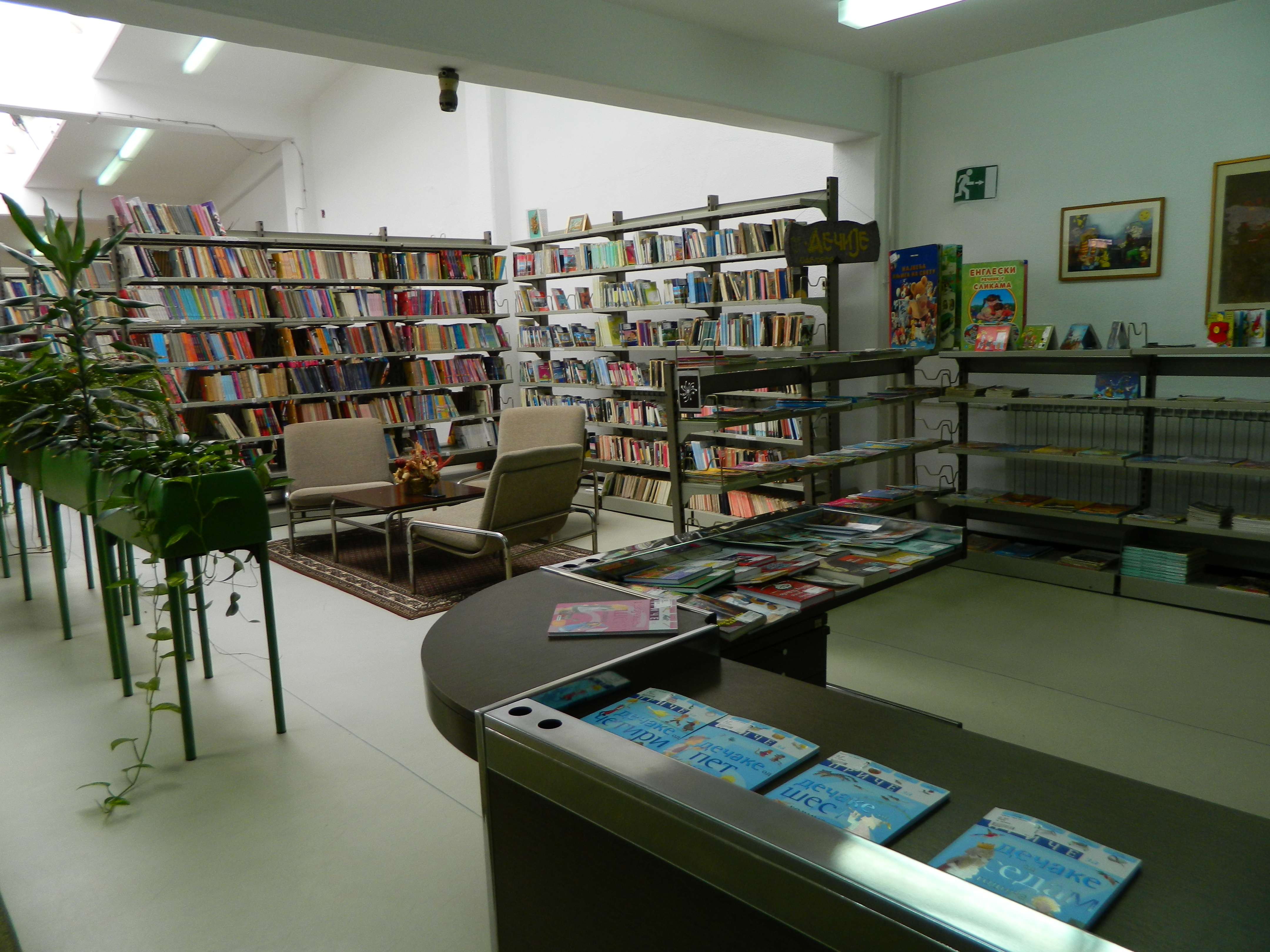 Pozajmno odeljenje biblioteke "Radoje Domanović", Surdulica